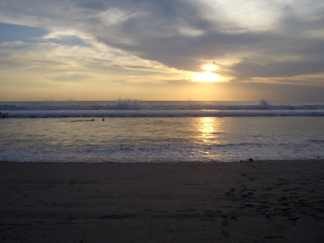 Pantai Kuta yang saya foto